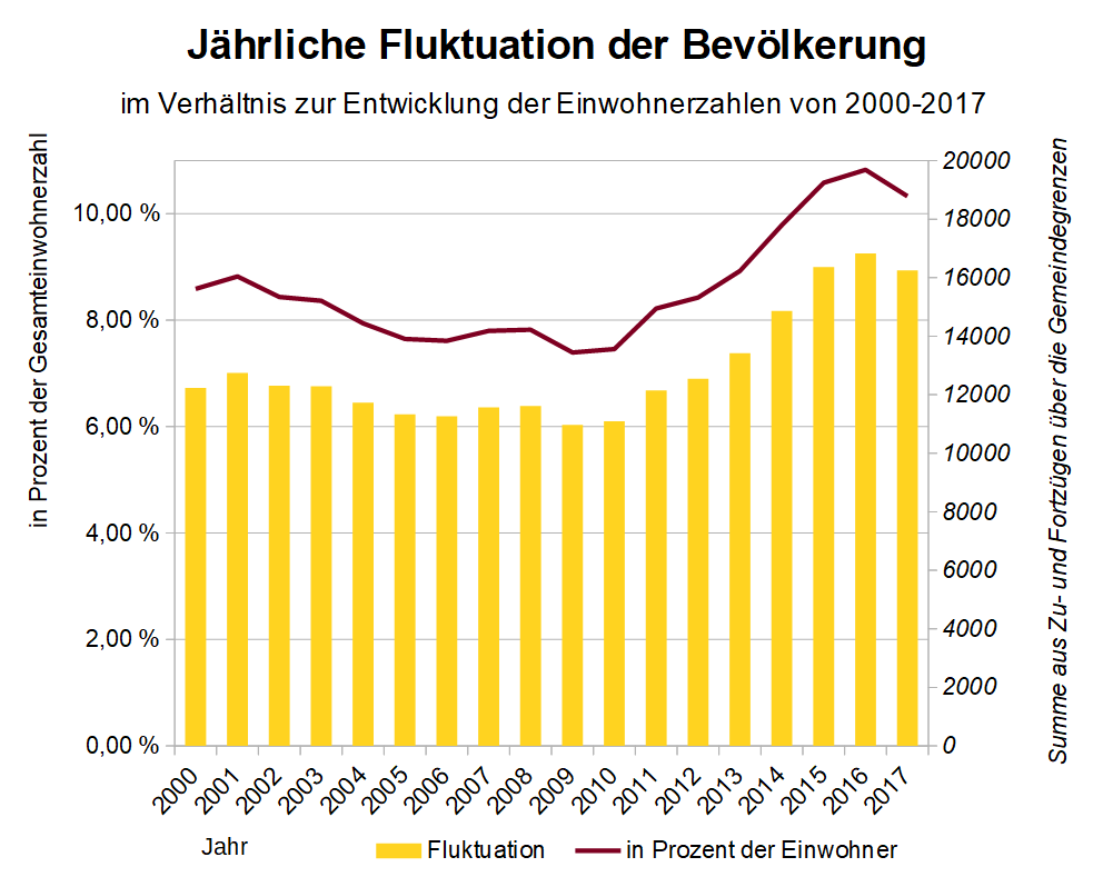 Diese Graphik zeigt die Fluktuation des Landkreises Landshut von 2000 bis 2017 und setzt sie ins Verhältnis der Geamteinwohnerzahl. Die Fluktuation wurde als Summe aus den Zu- und Fortzügen über die Landkreisgrenzen hinweg errechnet. Die Datenbasis entstammt dem Bayerischen Landesamt für Statistik.